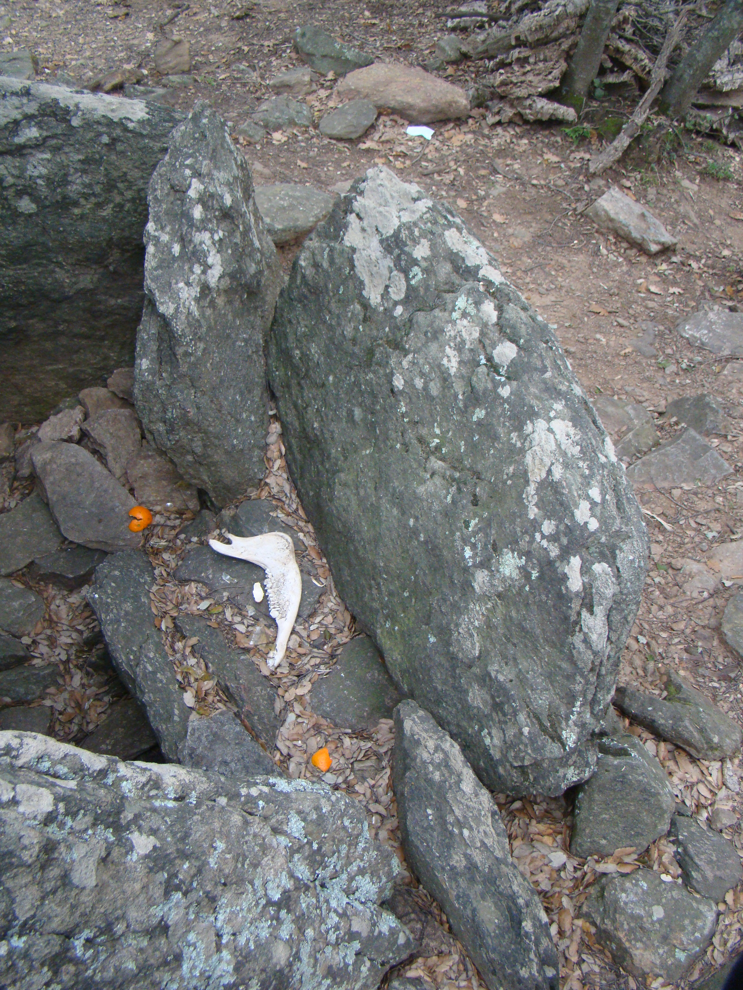 Détail des dalles de seuil du Dolmen de la Siureda